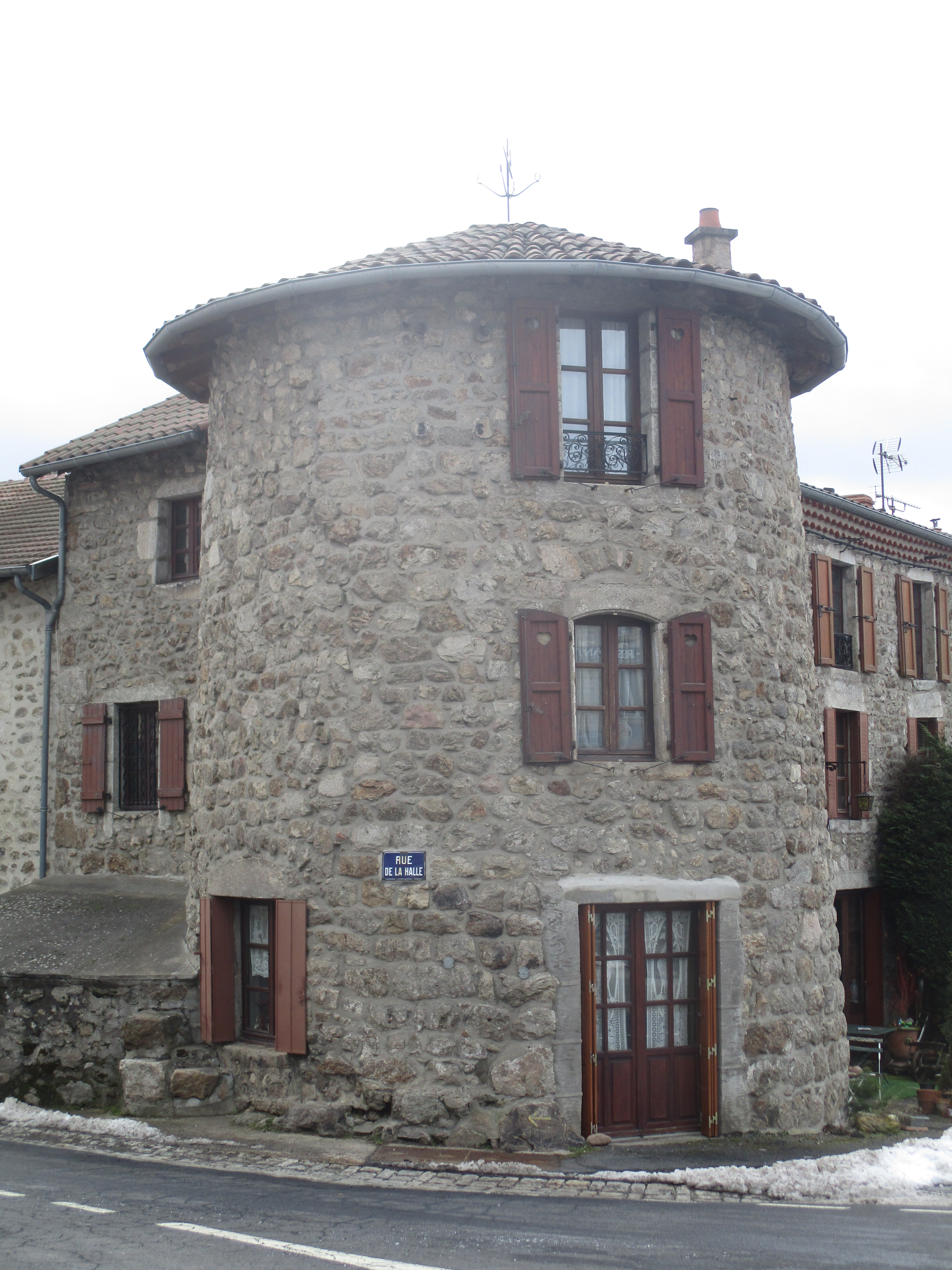 Tour du Marchedial, Craponne sur Arzon